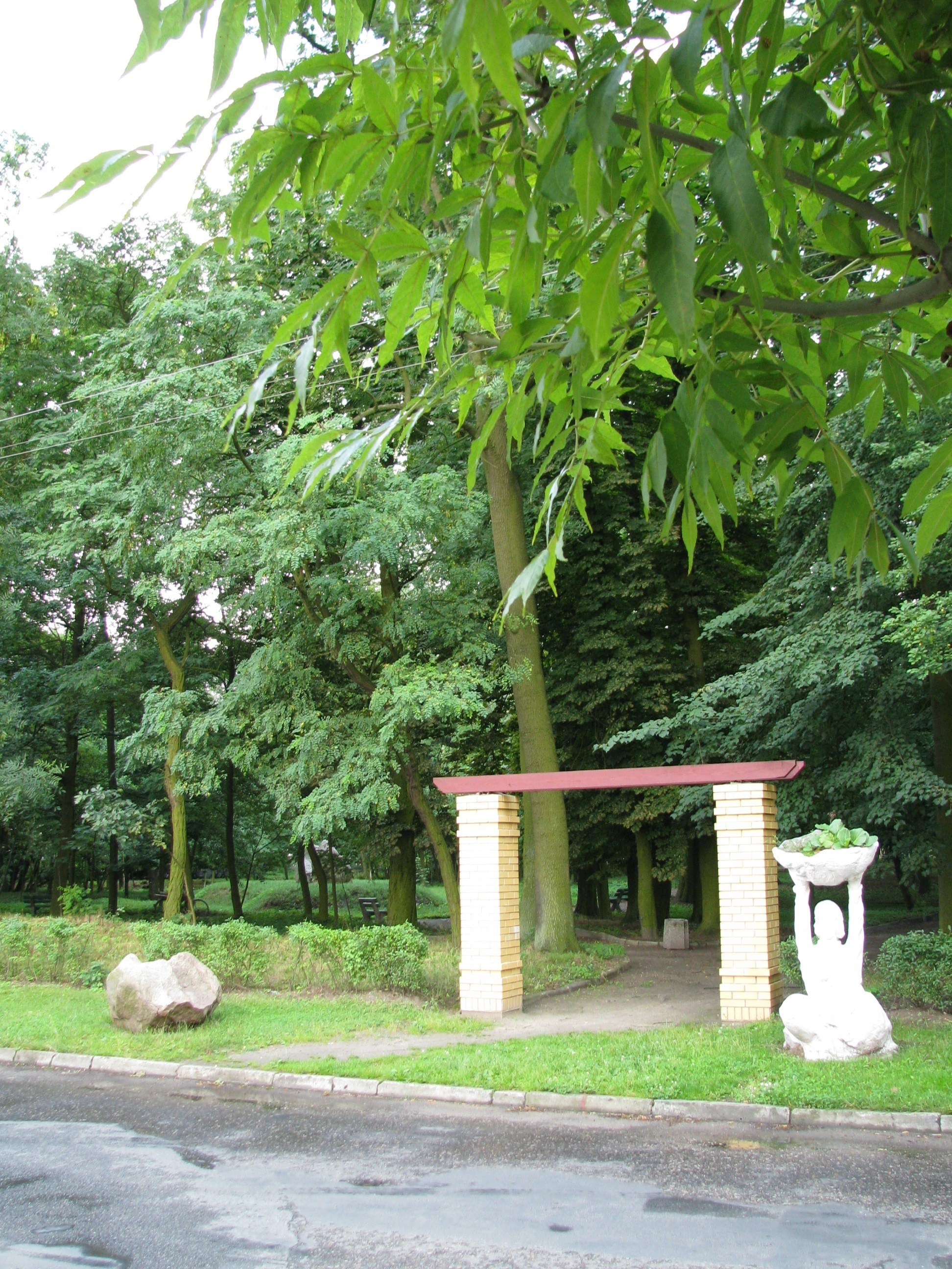 Park Miejski w Słupcy jedno z wejść do parku, ulica Koszucka, Słupca